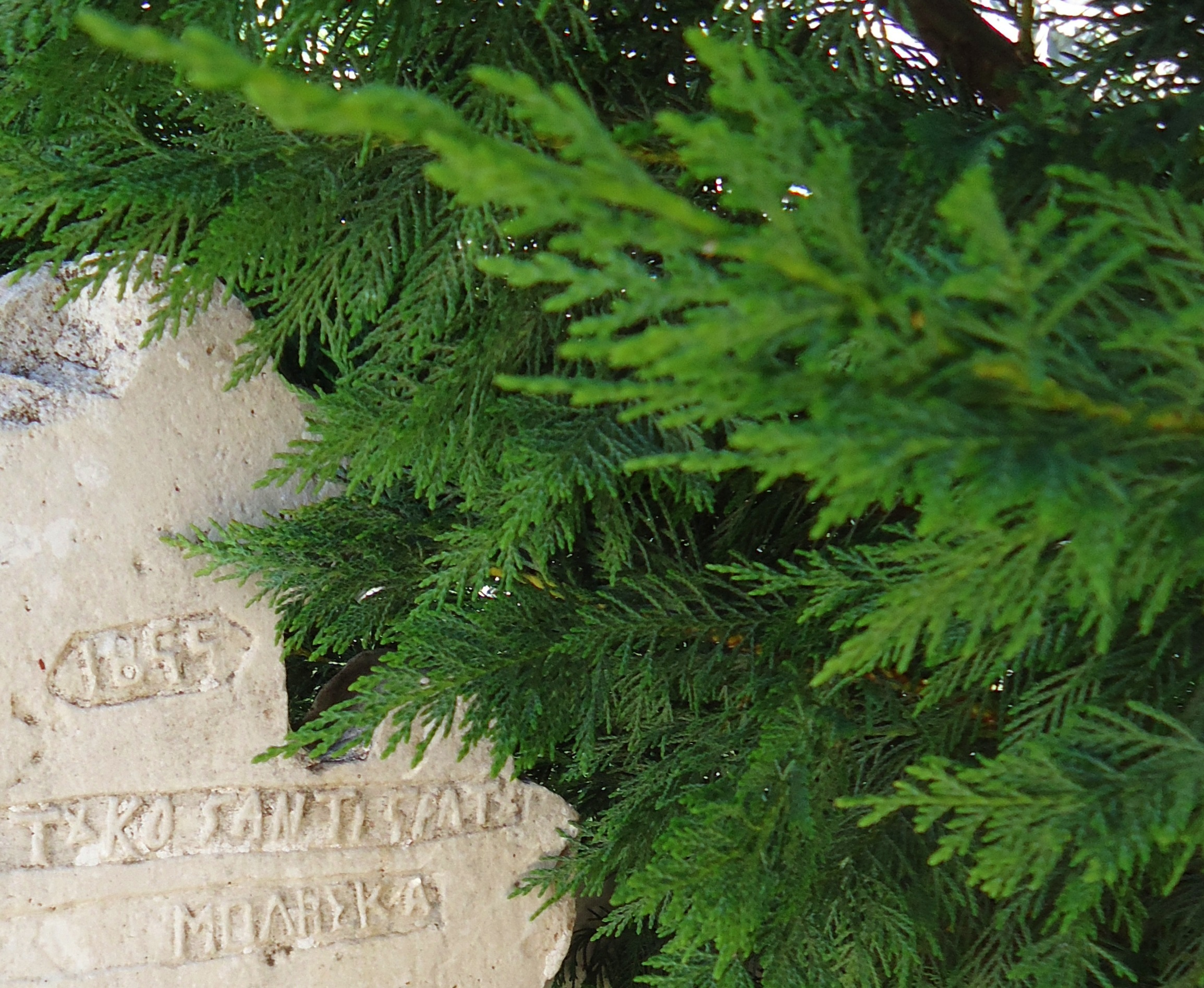 Επιγραφή του 1855 με το παλαιό όνομα του χωριού Καλόβατος Άρτας (Μπλήσκα).